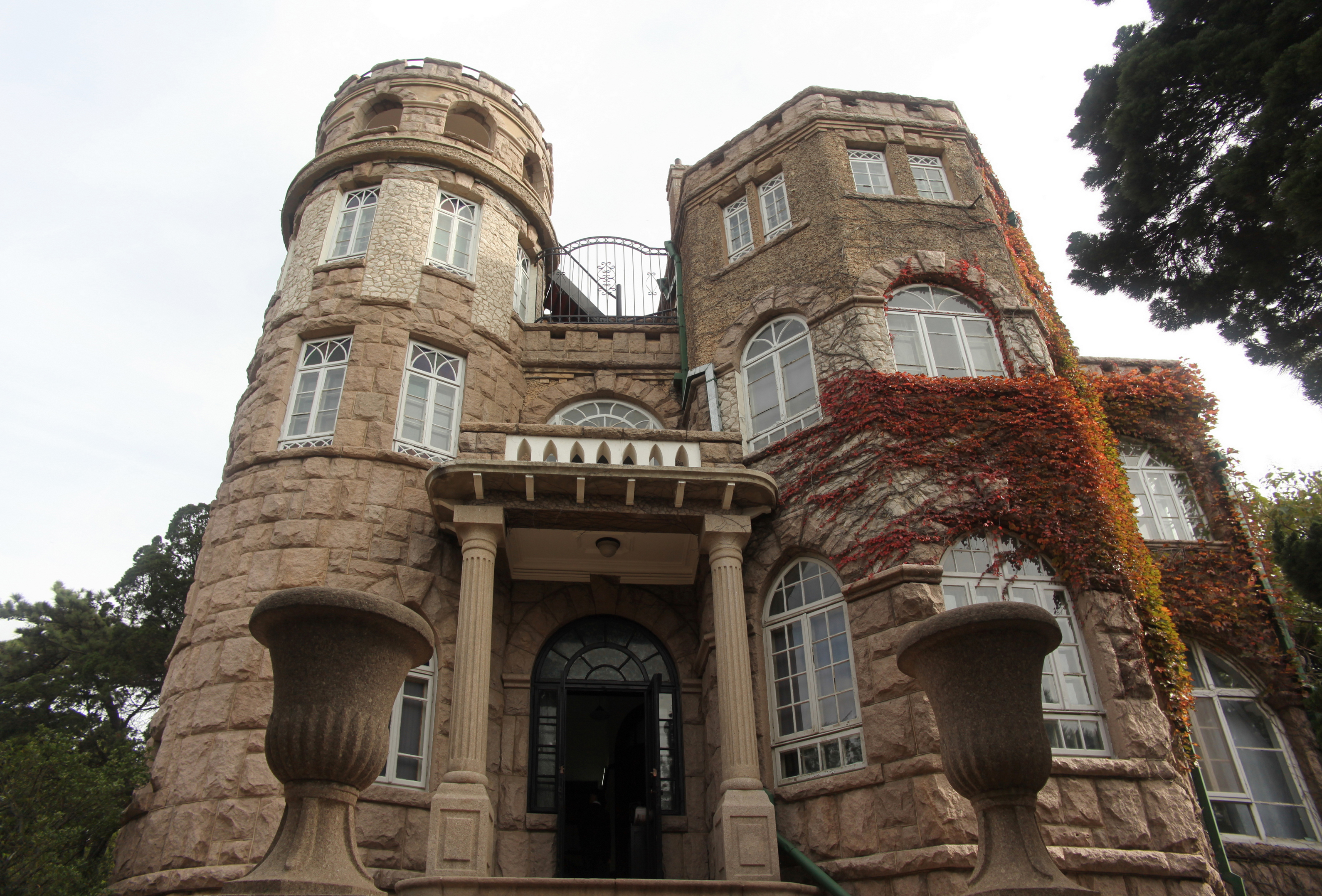 青岛八大观花石楼